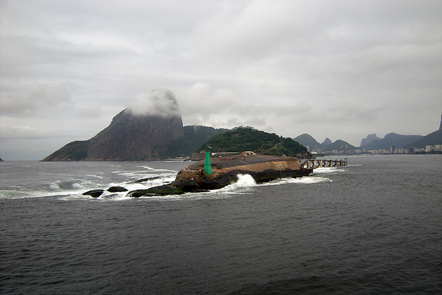 Forte da Lage – Baia da Guanabara – Rio de Janeiro. Foto de José Roitberg